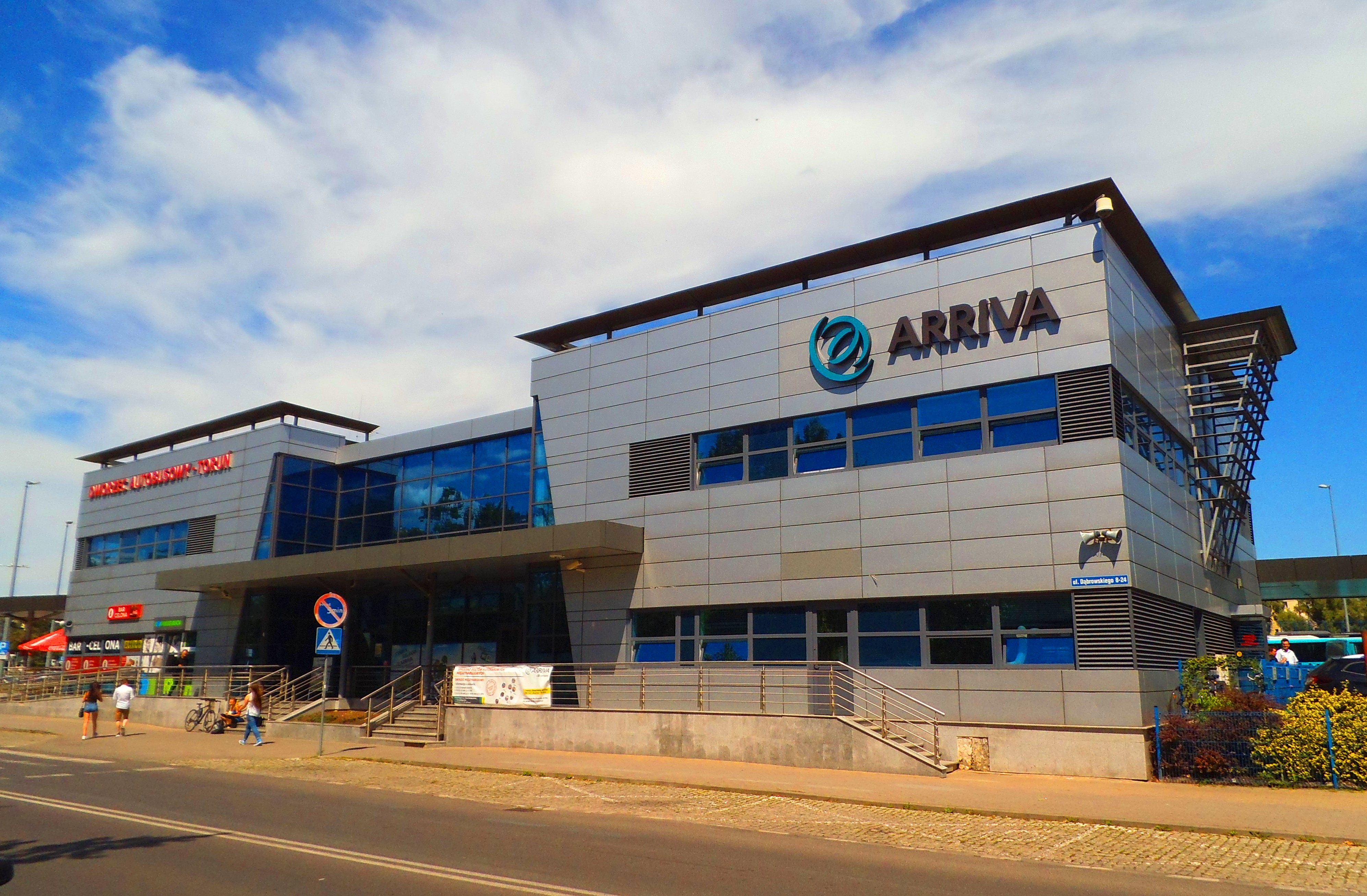 Dworzec autobusowy w Toruniu, 2016 rok